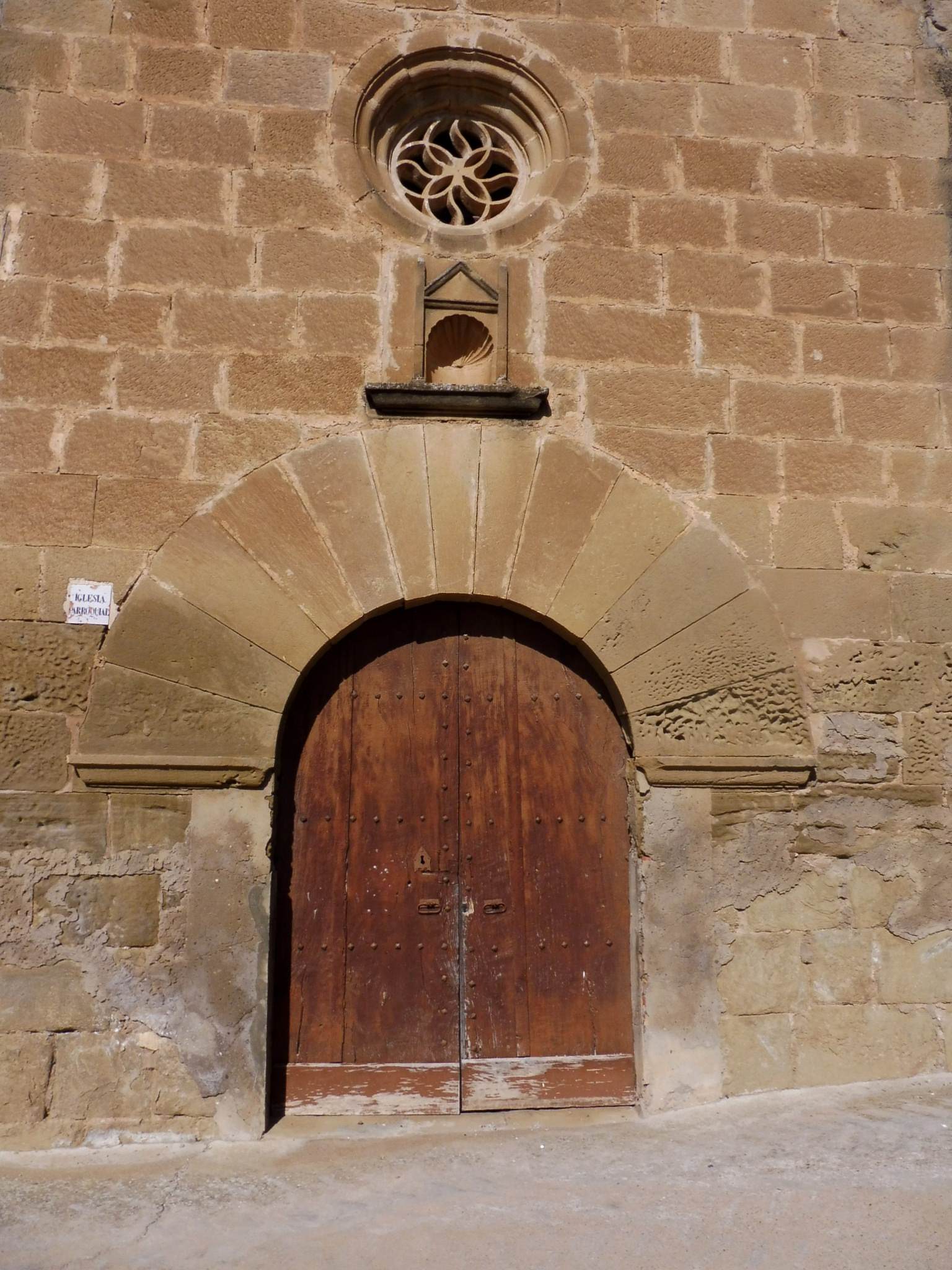 Església parroquial de Sant Miquel de Rubió del Mig (Foradada)